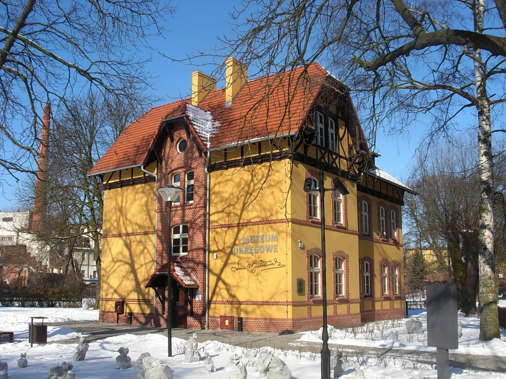 Muzeum Leona Wyczółkowskiego na Wyspie Młyńskiej